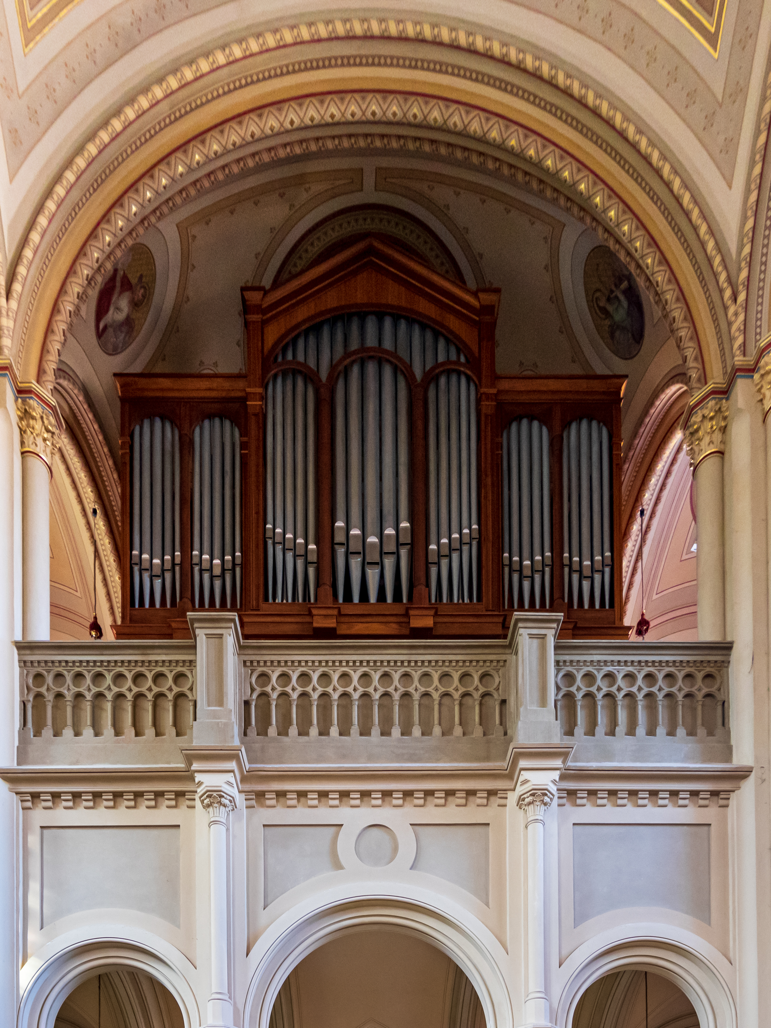 Mariä Himmelfahrt (Weißenhorn) - Orgel